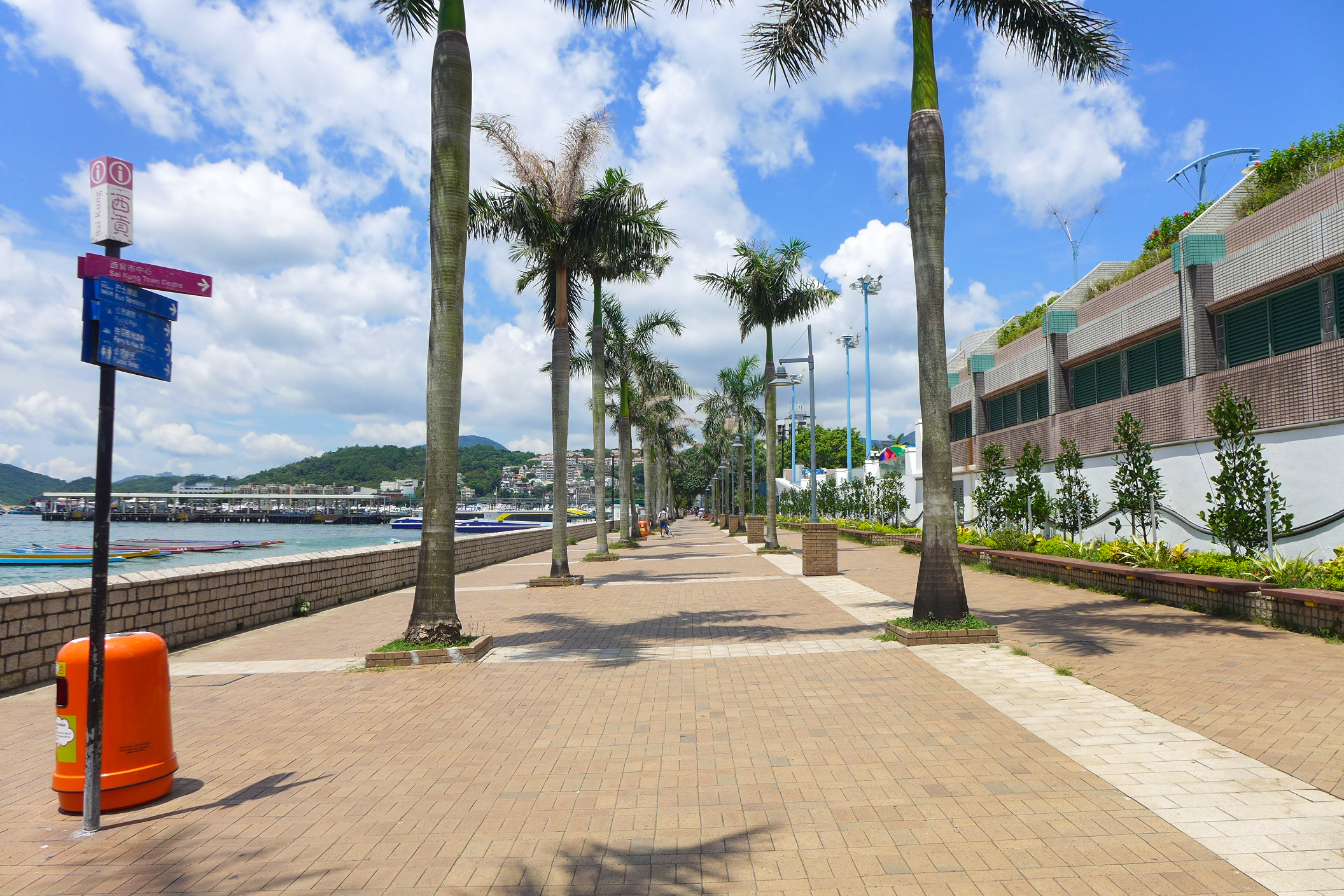 Sai Kung Waterfront